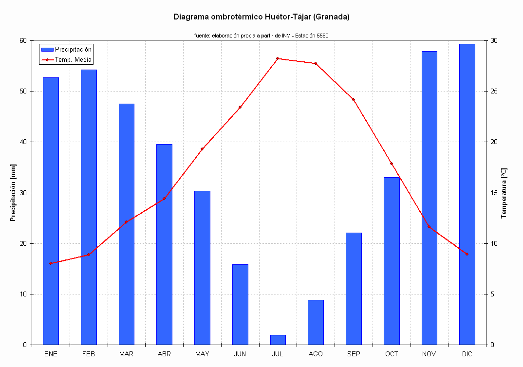 Diagrama ombrotérmico de Huétor-Tájar (Granada, España)